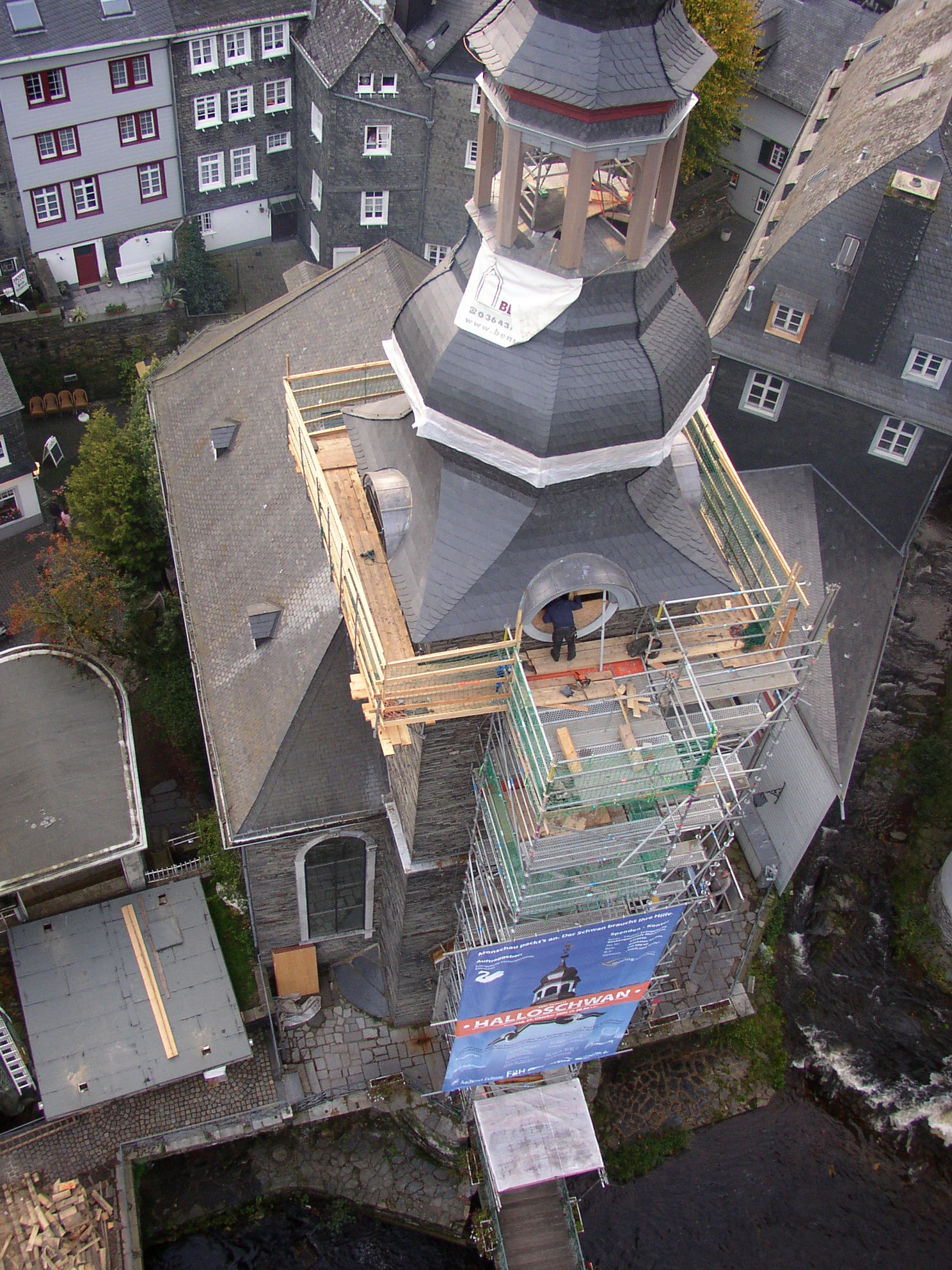 Ansicht von der instand gesetzten und in zwei Teilen wieder aufgesetzten Kirchturmhabe, 26. Oktober 2006